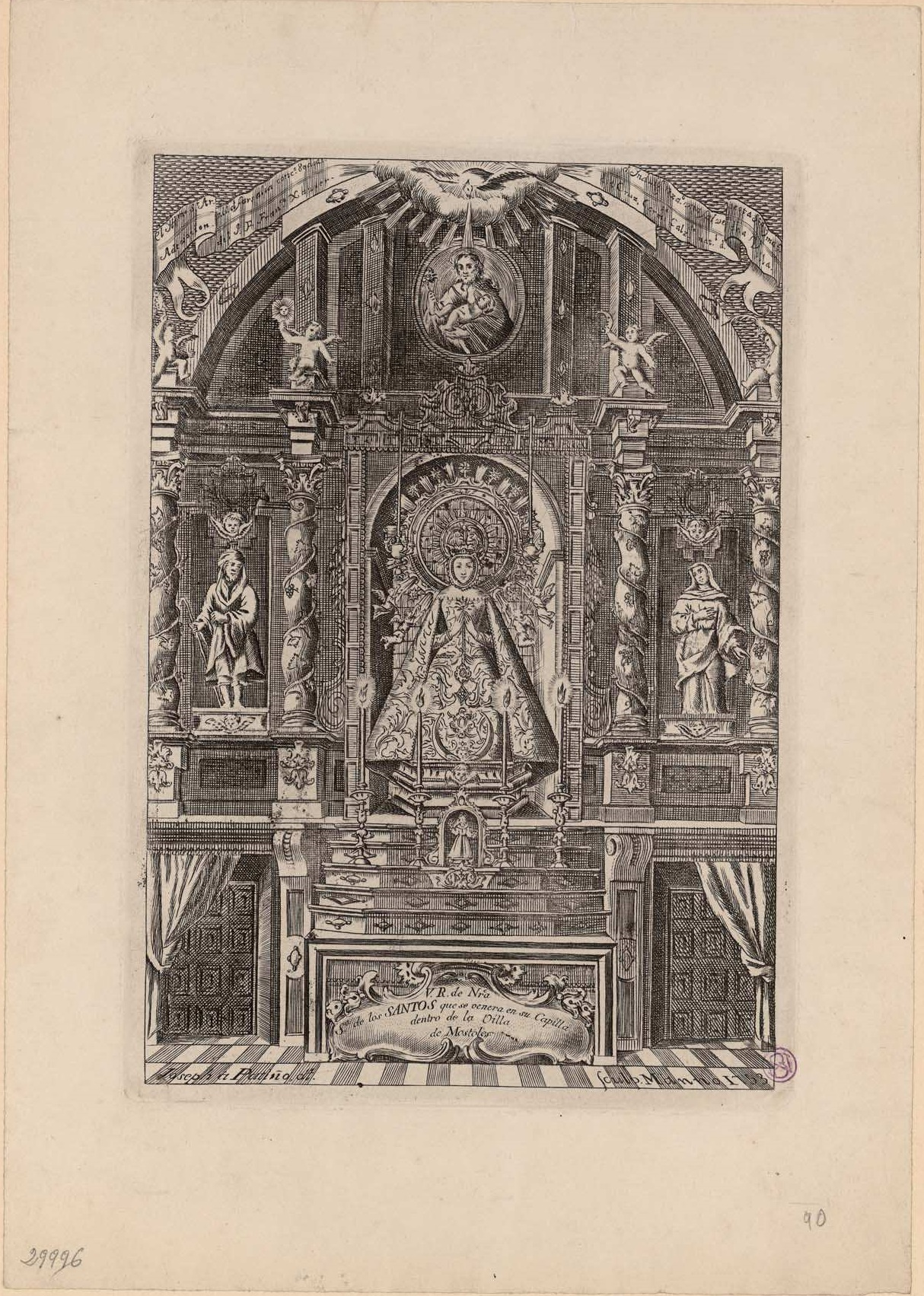 V. R. de Ntra Sra de los Santos que se venera en su Capilla dentro de la Villa de Móstoles, grabado calcográfico, Biblioteca Nacional de España